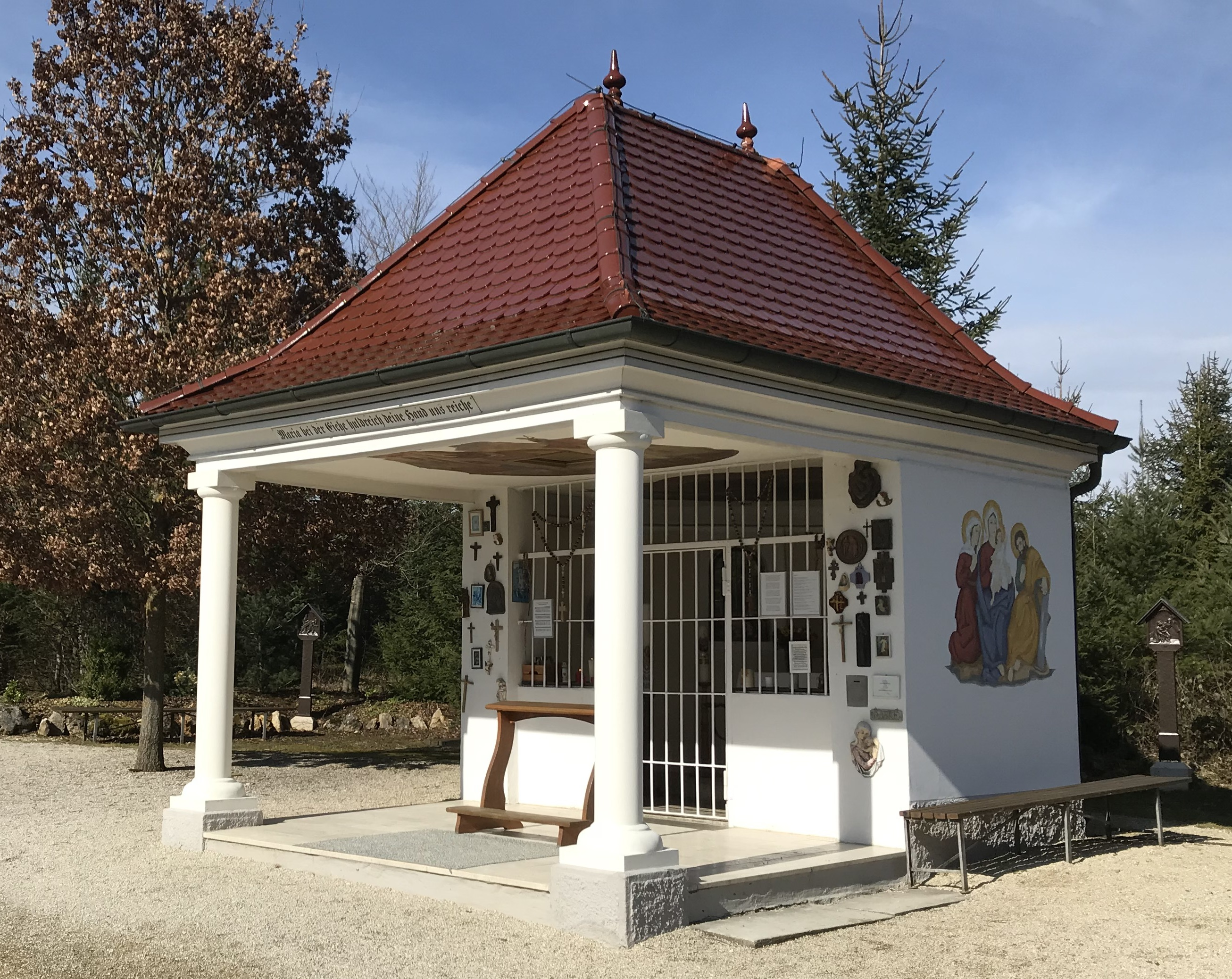 Wallfahrtskapelle Maria Eich bei Ebnat (Aalen)